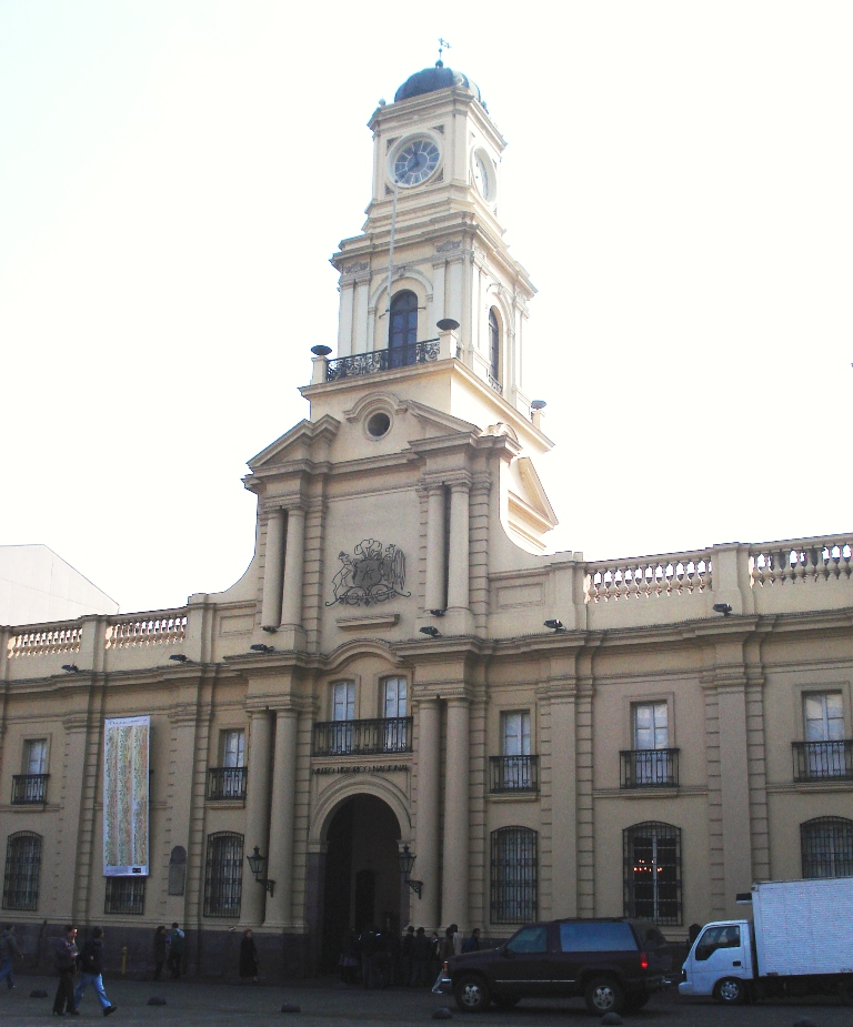 Museo Histórico Nacional de Chile, ubicado en la Plaza de Armas de la ciudad de Santiago de Chile.